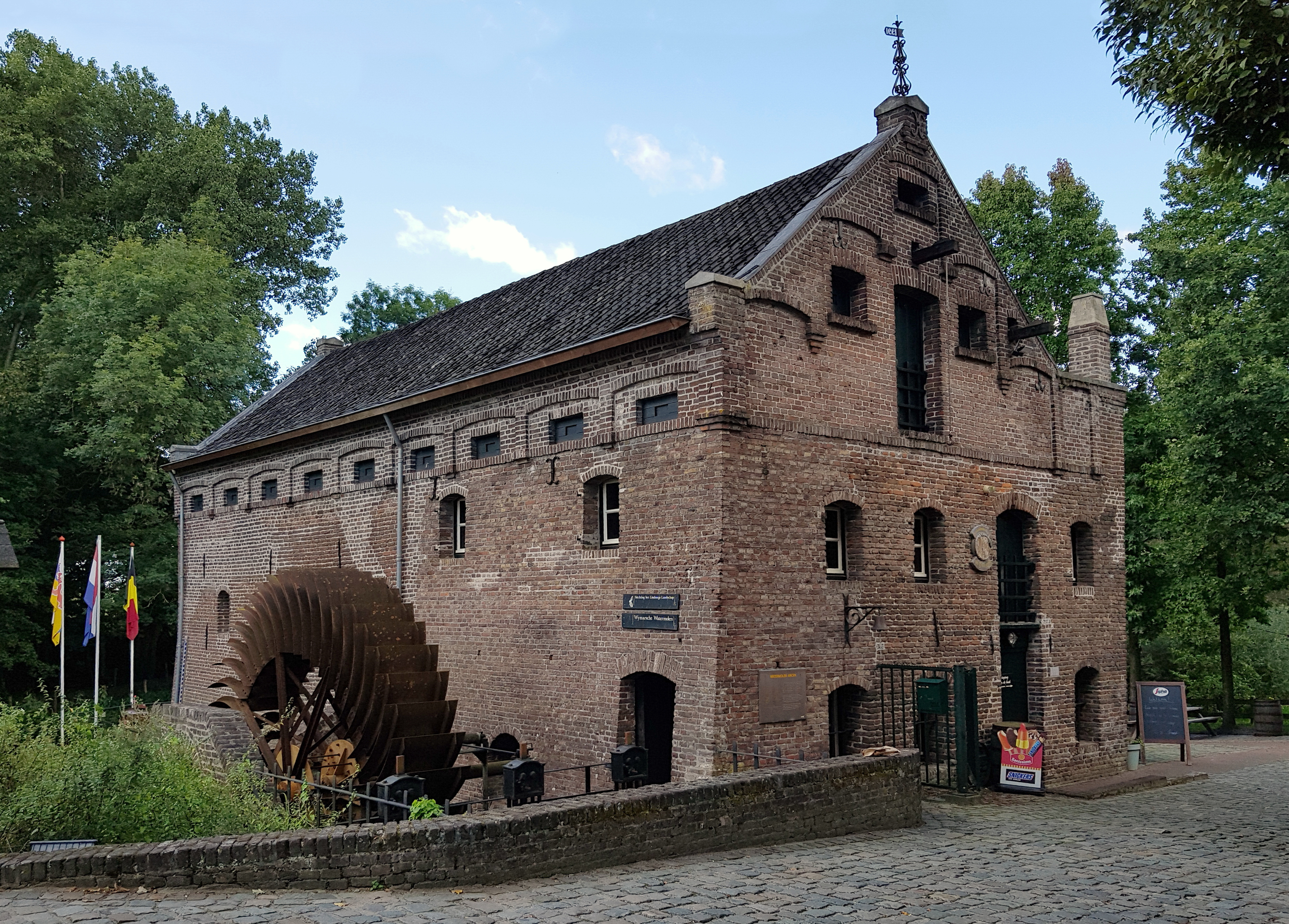 Brennerei De IJsvogel in der denkmalgeschützten Wijmarsche Wassermühle im Naturschutzgebiet Barbara's Weerd in Arcen, Schans 20.